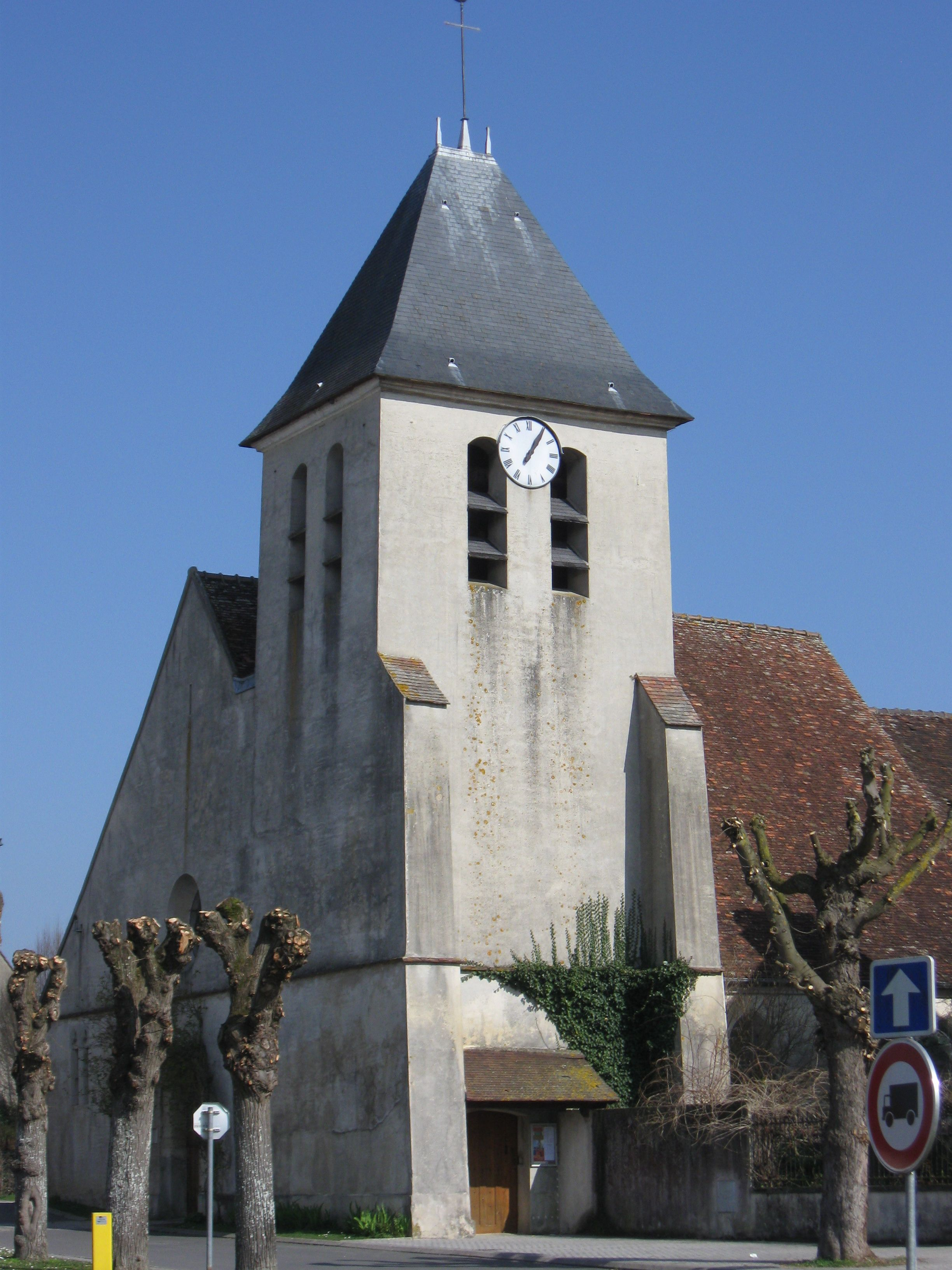 Église Saint-Étienne de Mareuil-lès-Meaux. (Seine-et-Marne, région Île-de-France).